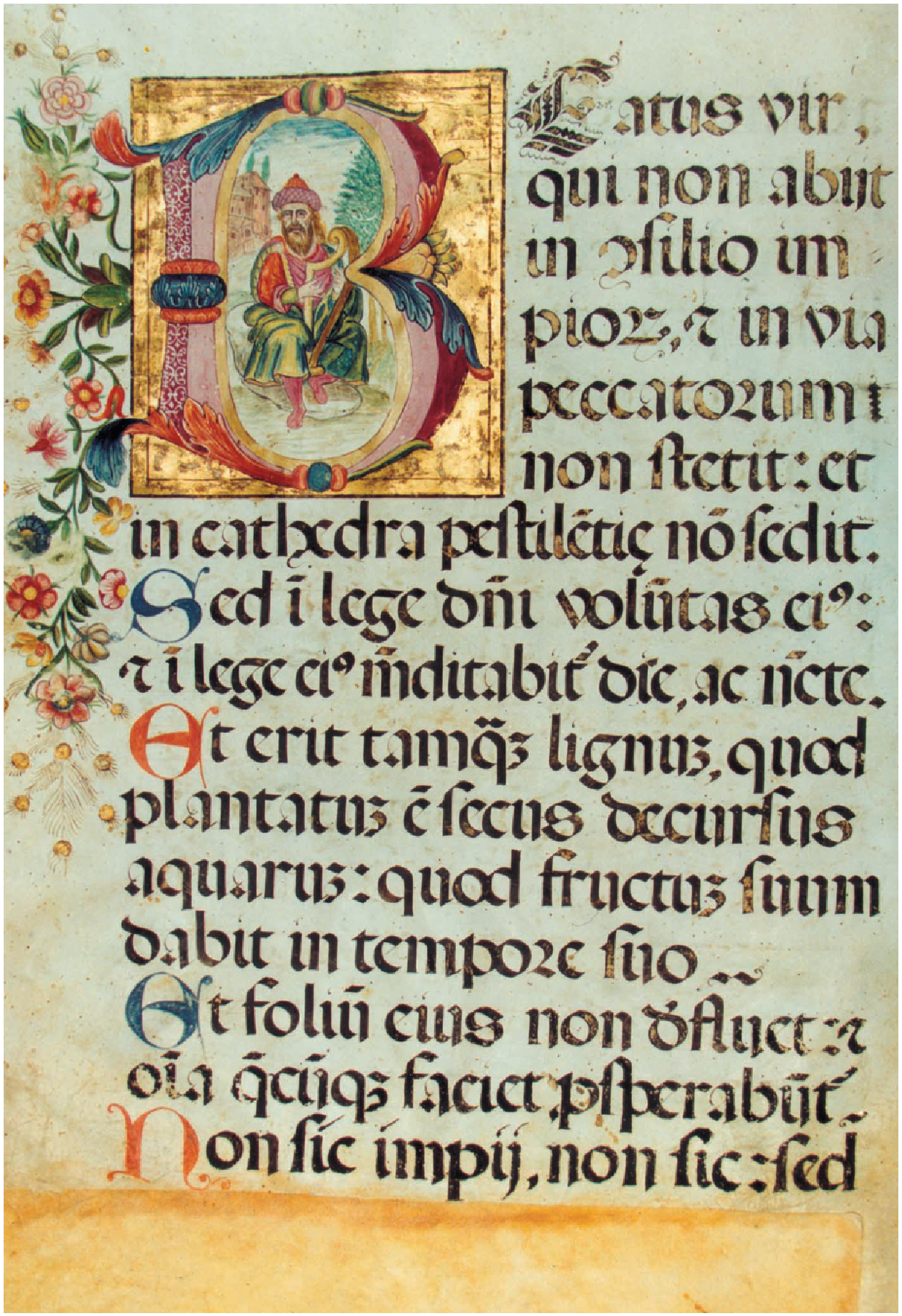 Frontespizio del Salterio diurno del XVII sec. prov. Convento dei Cappucini di CL